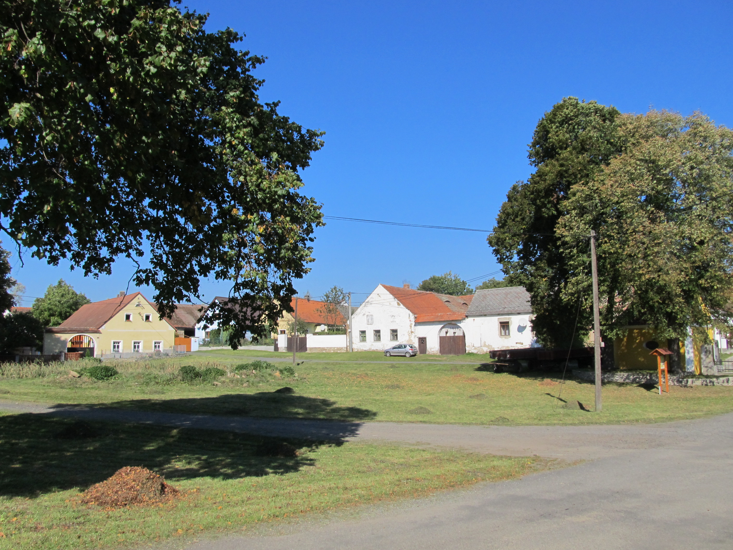 Černíč - náves